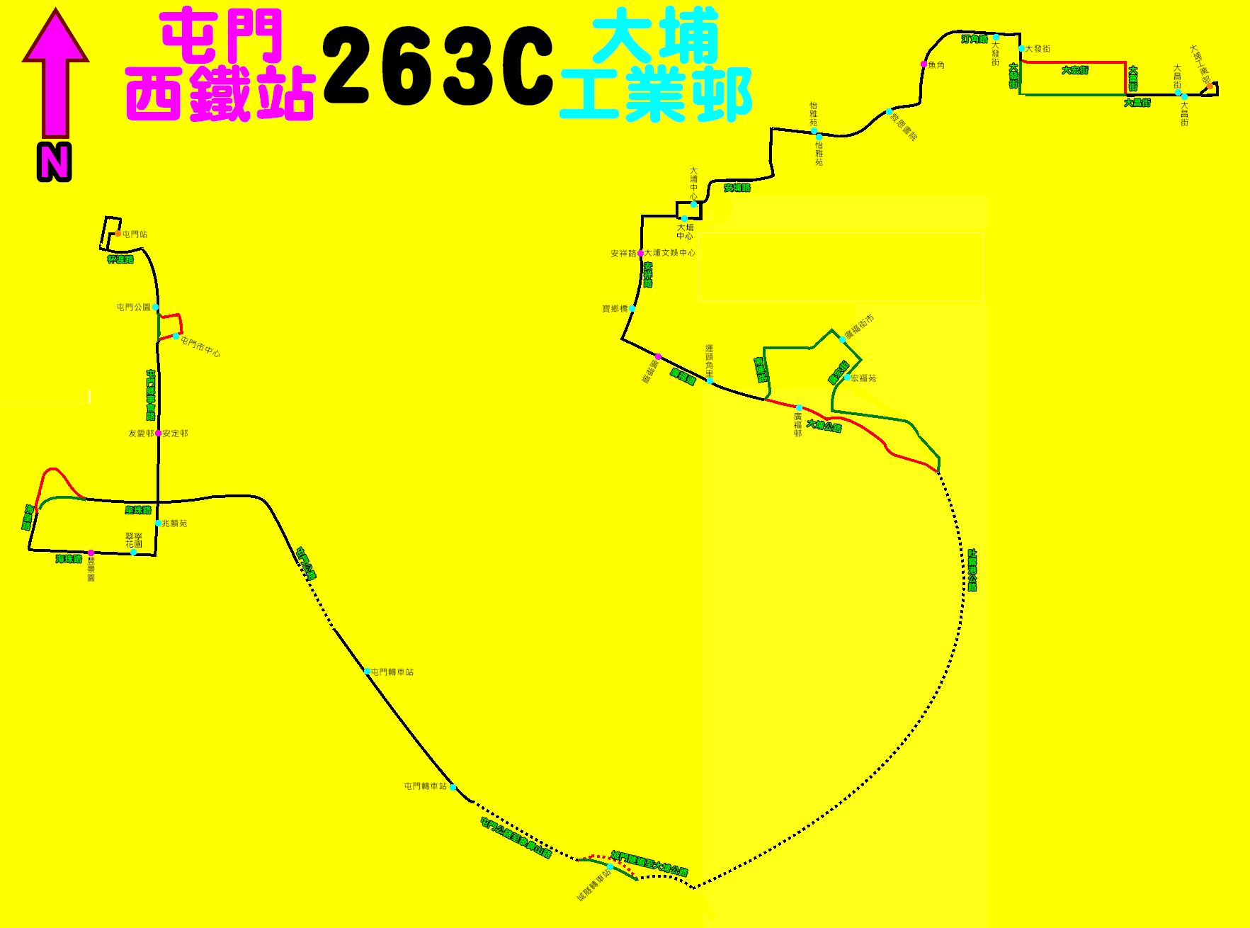 九巴263C線的走線圖